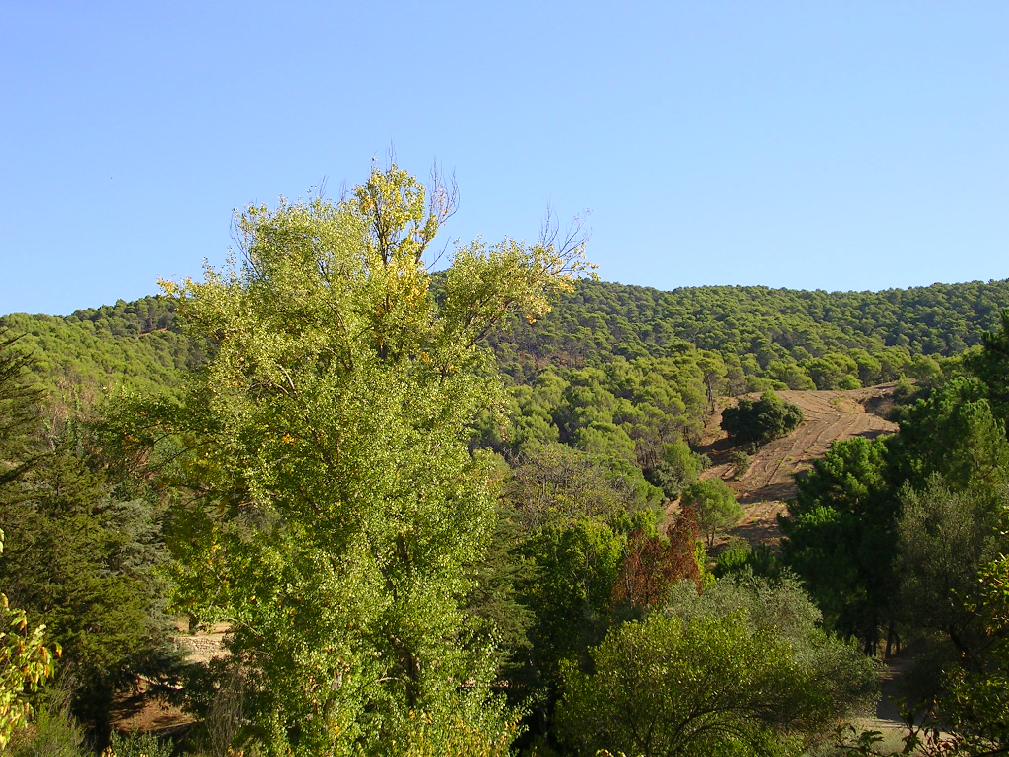 Parque Natural Montes de Málaga, Andalucía, España.